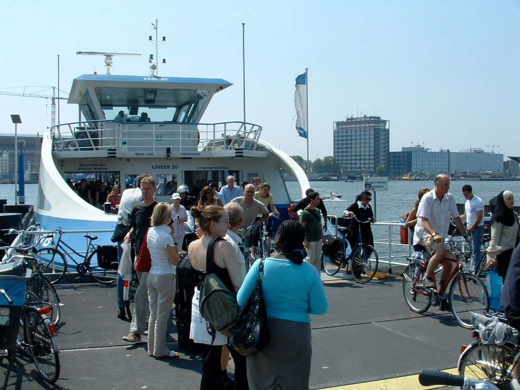 Ferry from Amsterdam